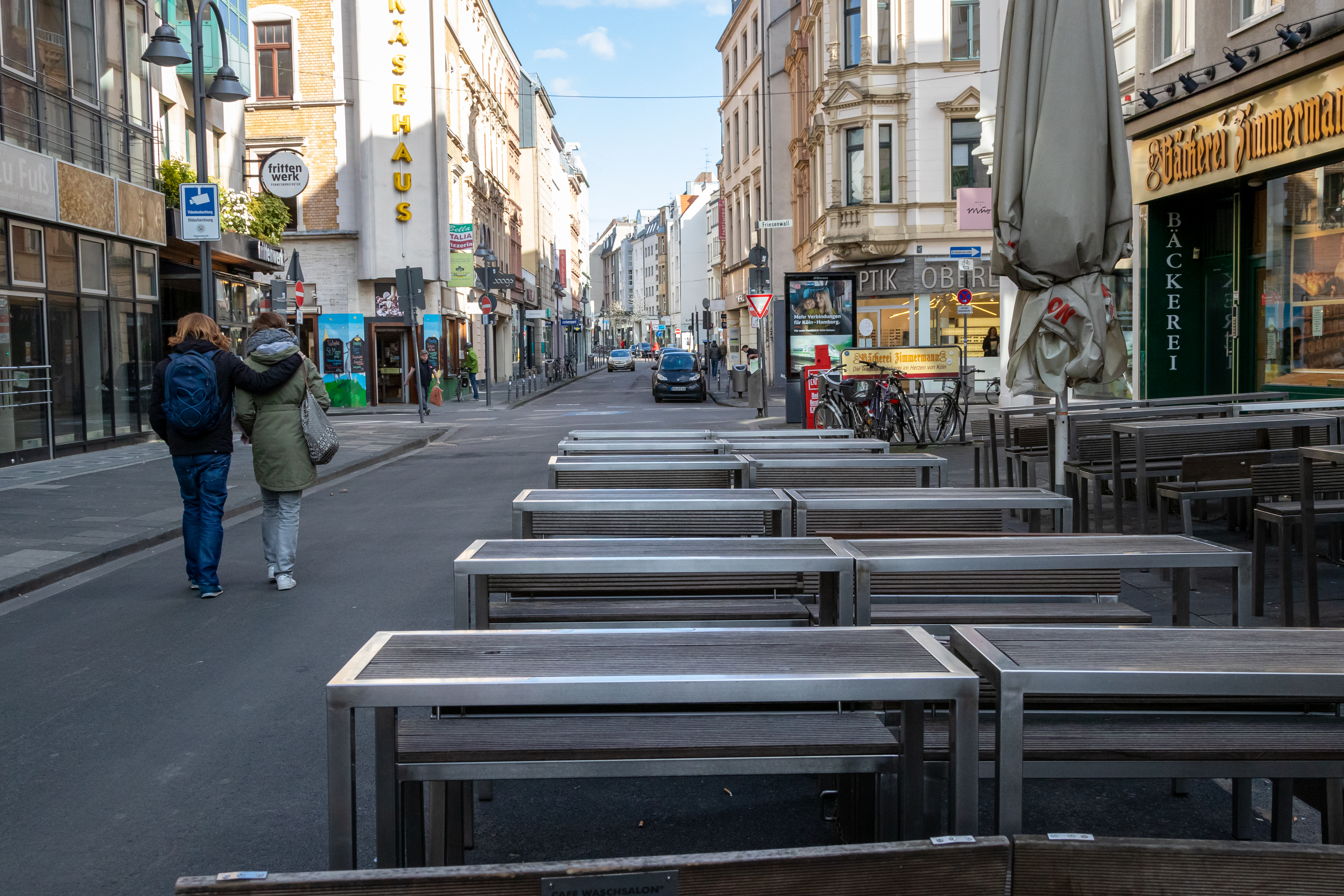 Geschlossene Straßengastronomie in der Ehrenstraße, Köln (Café Waschsalon) am Samstagnachmittag aufgrund der Covid-19-Pandemie